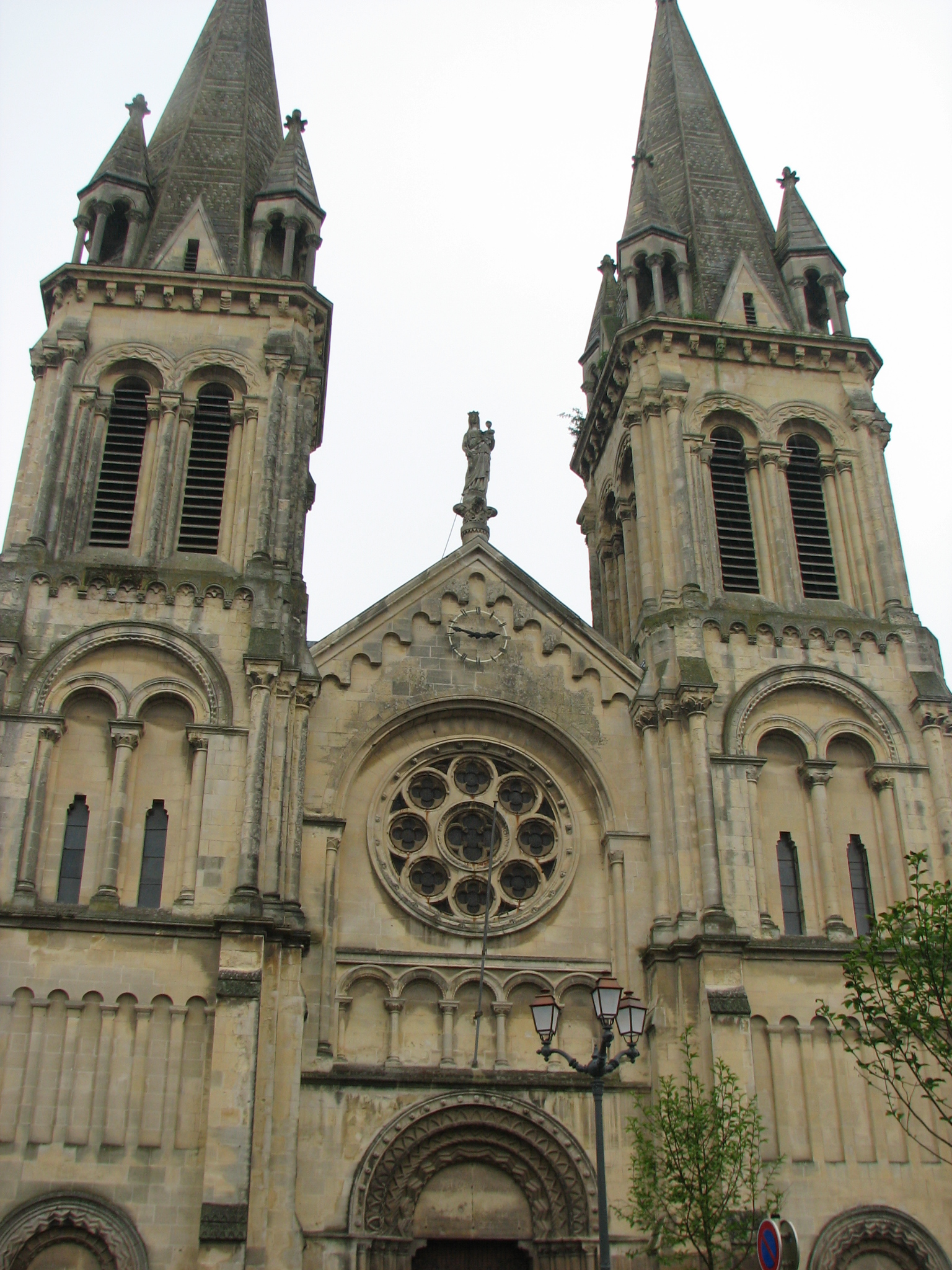 L’Église Notre-Dame du Vœu